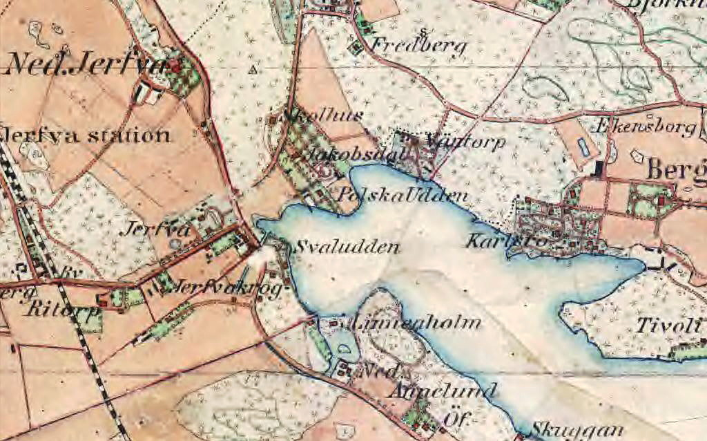 Norra delen av Brunnsviken med Jakobsdal, Karlsro, Annelund m.fl.